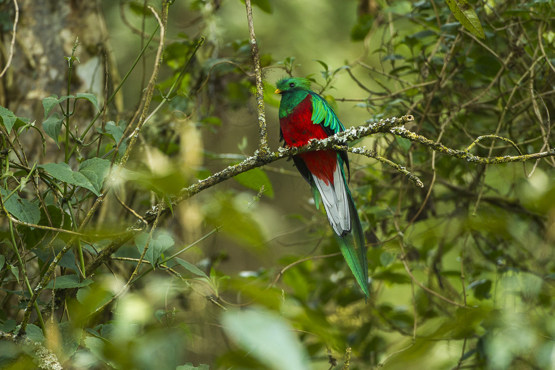 Resplendent Quetzal male - Cloud Forest in Costa Rica _S4E9570